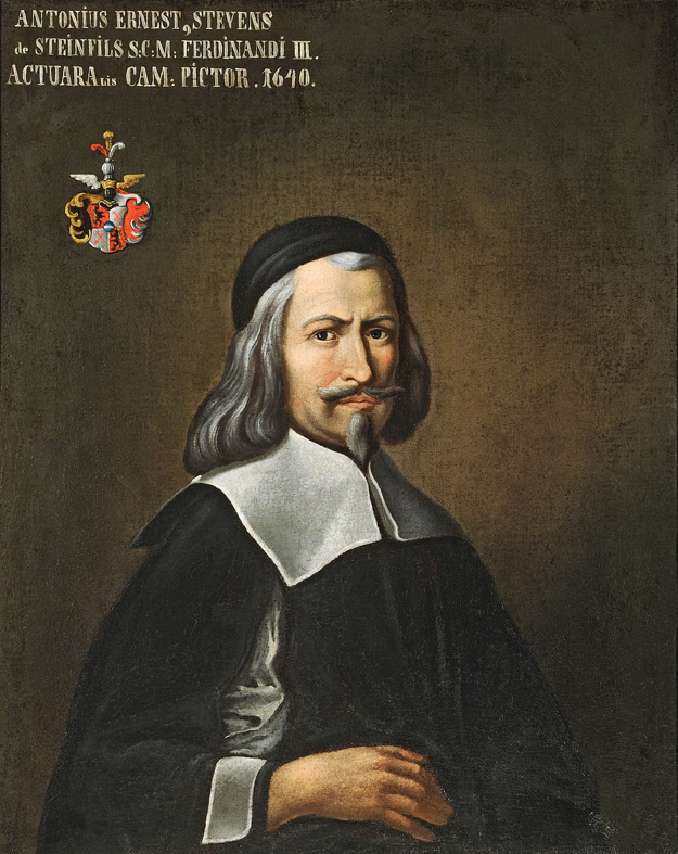 Antonín Stevens, autoportrét v pozdním věku